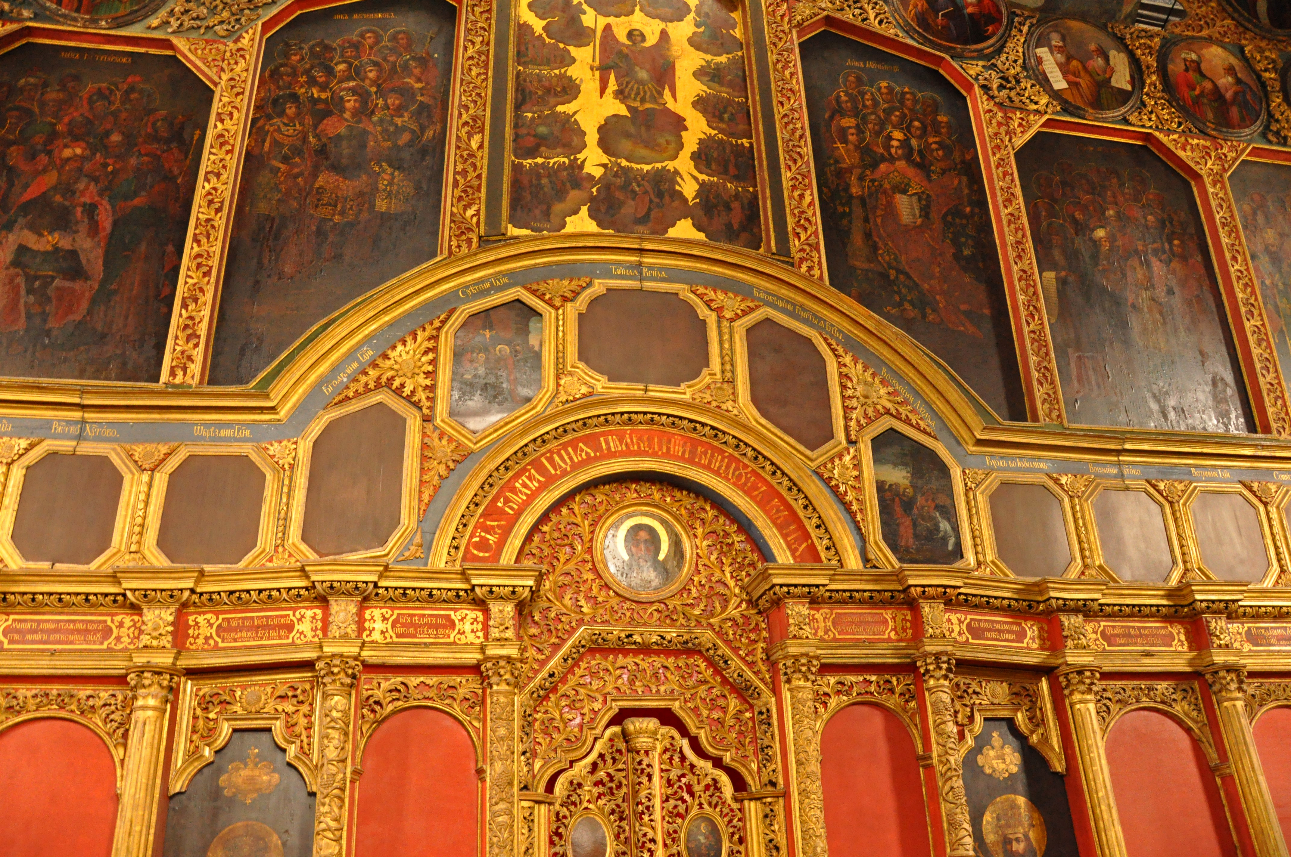 Фрагмент Іконостасу Церкви Всіх Святих. Церква Всіх Святих Києво-Печерської лаври. Центральна частина іконостасу